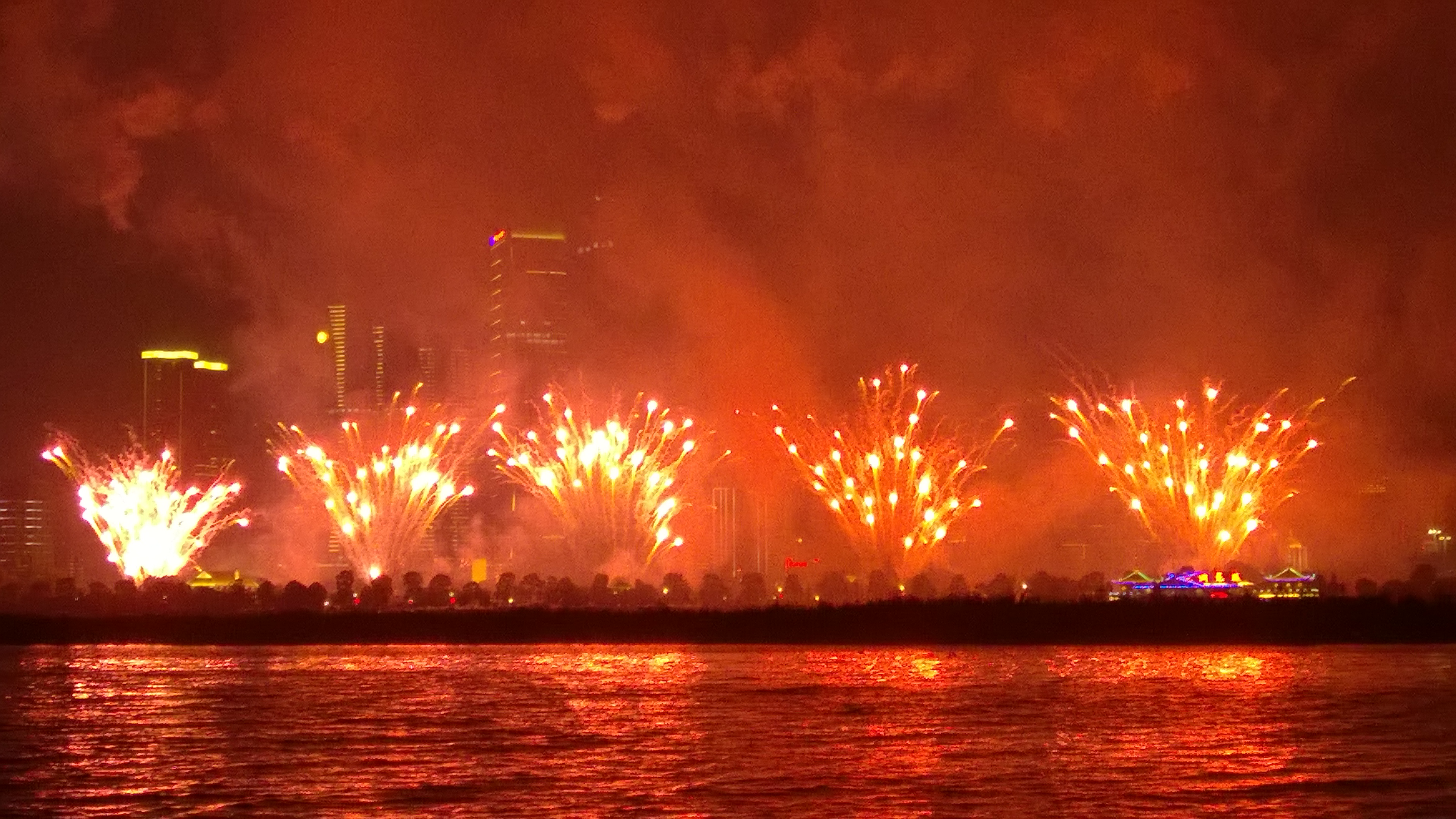 拍摄于橘子洲西岸的潇湘路